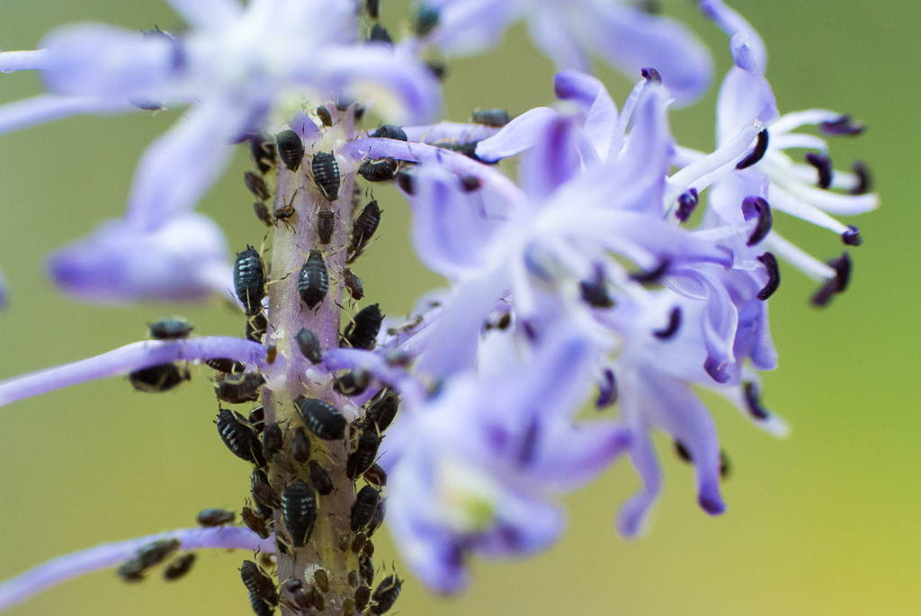 כנימות